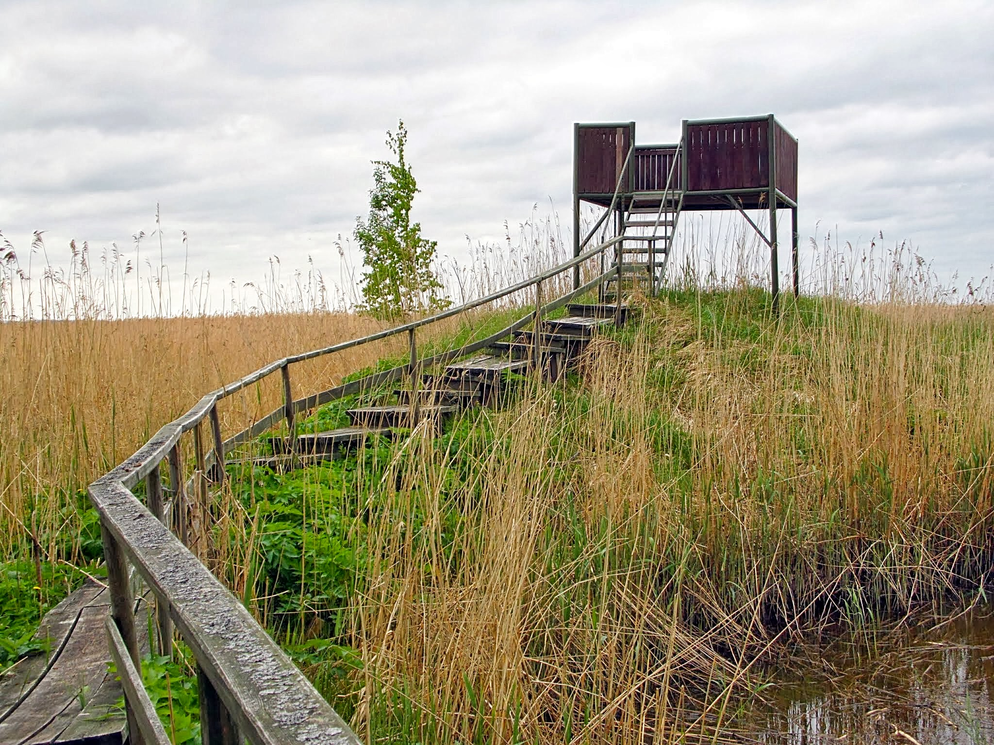 Kiideva on küla Lääne maakonnas Ridala vallas. Kiideva asub Matsalu rahvuspargi territooriumil. Matsalu lahe rannikul paikneb vaateplatvorm, nn Priskuse tornike. Linnuvaatlejatele lemmikpaigaks. 2013 on tornike suletud tema kehva seisundi tõttu.